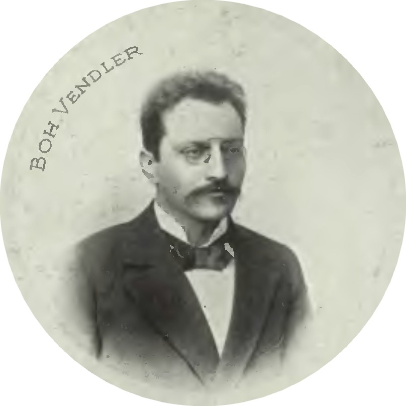 Portrét – Bohumil Vendler (1865-1948), Český sbormistr, dirigent a hudební pedagog .